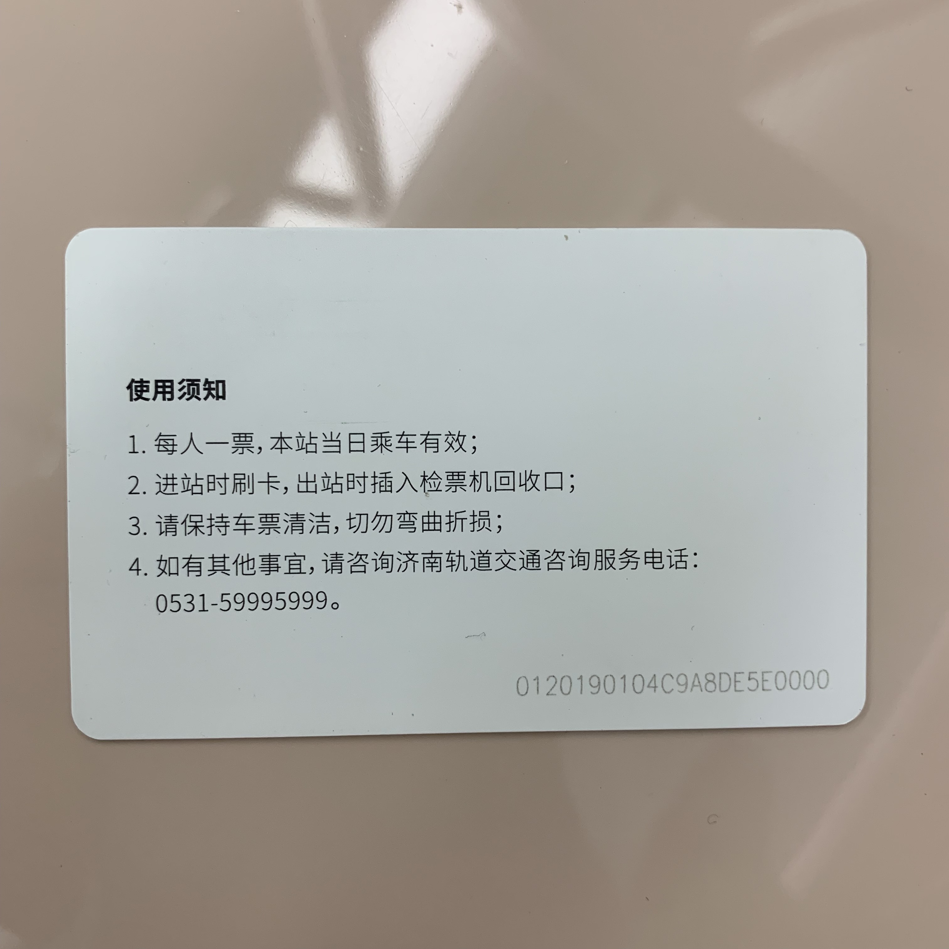 中文（中国大陆）: 济南地铁单程票反面